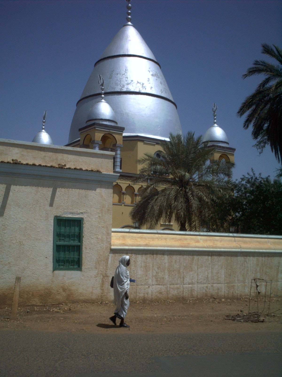 from German Wikipedia, user Benutzer:Viaorange, under PD, with description: Beschreibung: Grab des Mahdi in Omdurman, Sudan selbst fotographiert (self-made)